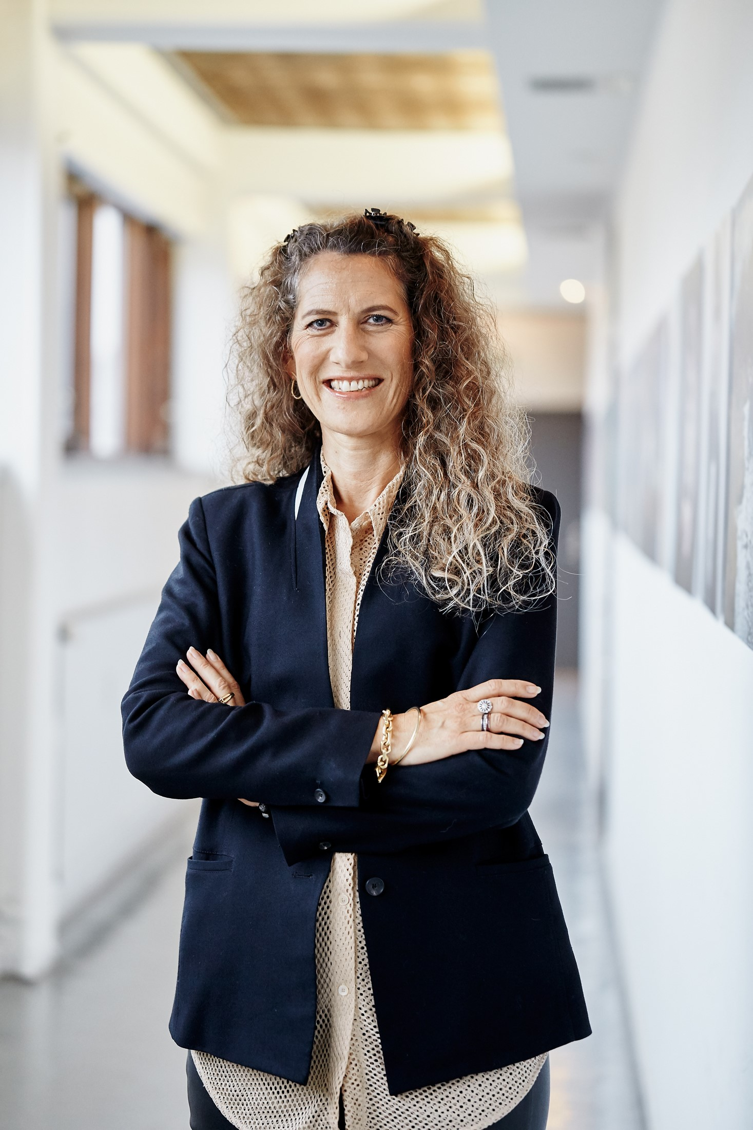 Portræt af Helle Busck Fensvig